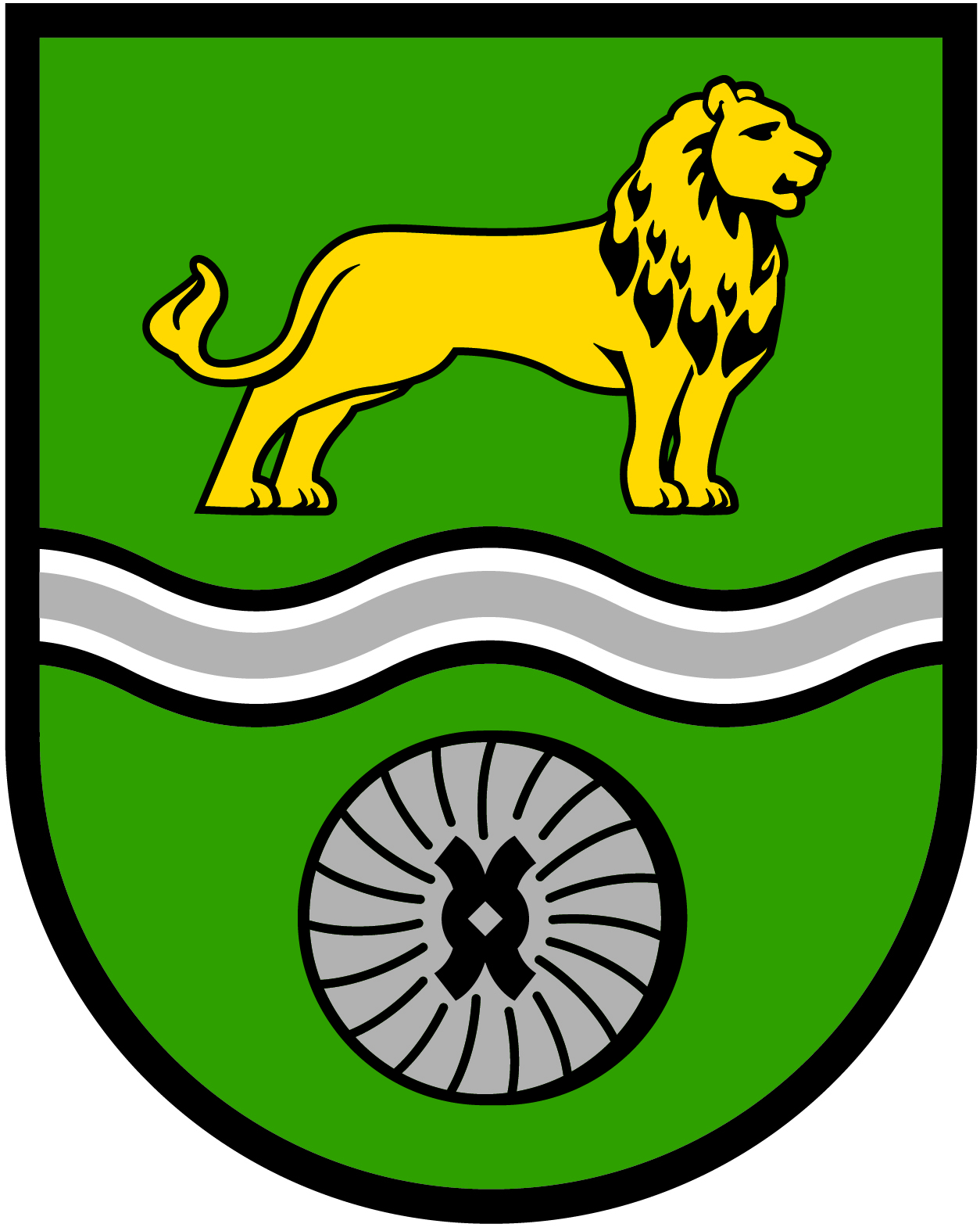 Wappen der Gemeinde Seevetal ab 2014, freigegeben von der Gemeinde